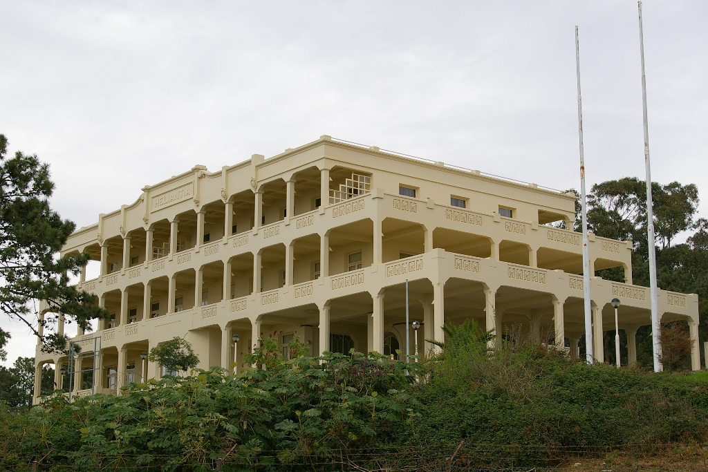 "Heliantia" building in Valadares, Vila Nova de Gaia, Portugal. Sanatório e Clínica Heliântia / Clínica do Dr. Ferreira Alves / Edifício Heliântia. Portugal, Porto, Vila Nova de Gaia, União das freguesias de Gulpilhares e Valadares, Avenida dos Sanatórios. This monument is classified as Monumento de Interesse Público.